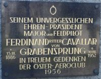 Grabdenkmal des Ferdinand von Cavallar im Wiener Zentralfriedhof